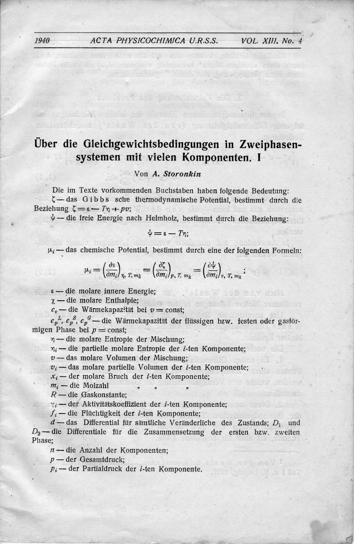 Копия оттиска статьи А. В. Сторонкина «Об условиях равновесия в двухфазных многокомпонентных системах. I» (на немецком языке). Журнал Acta physicochimica. U.R.S.S. Vol. XIII. No.4. M. 1940. P. 505-530